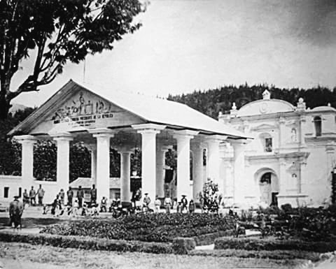 Templo de Minerva en Antigua Guatemala aproximadamente en 1912.